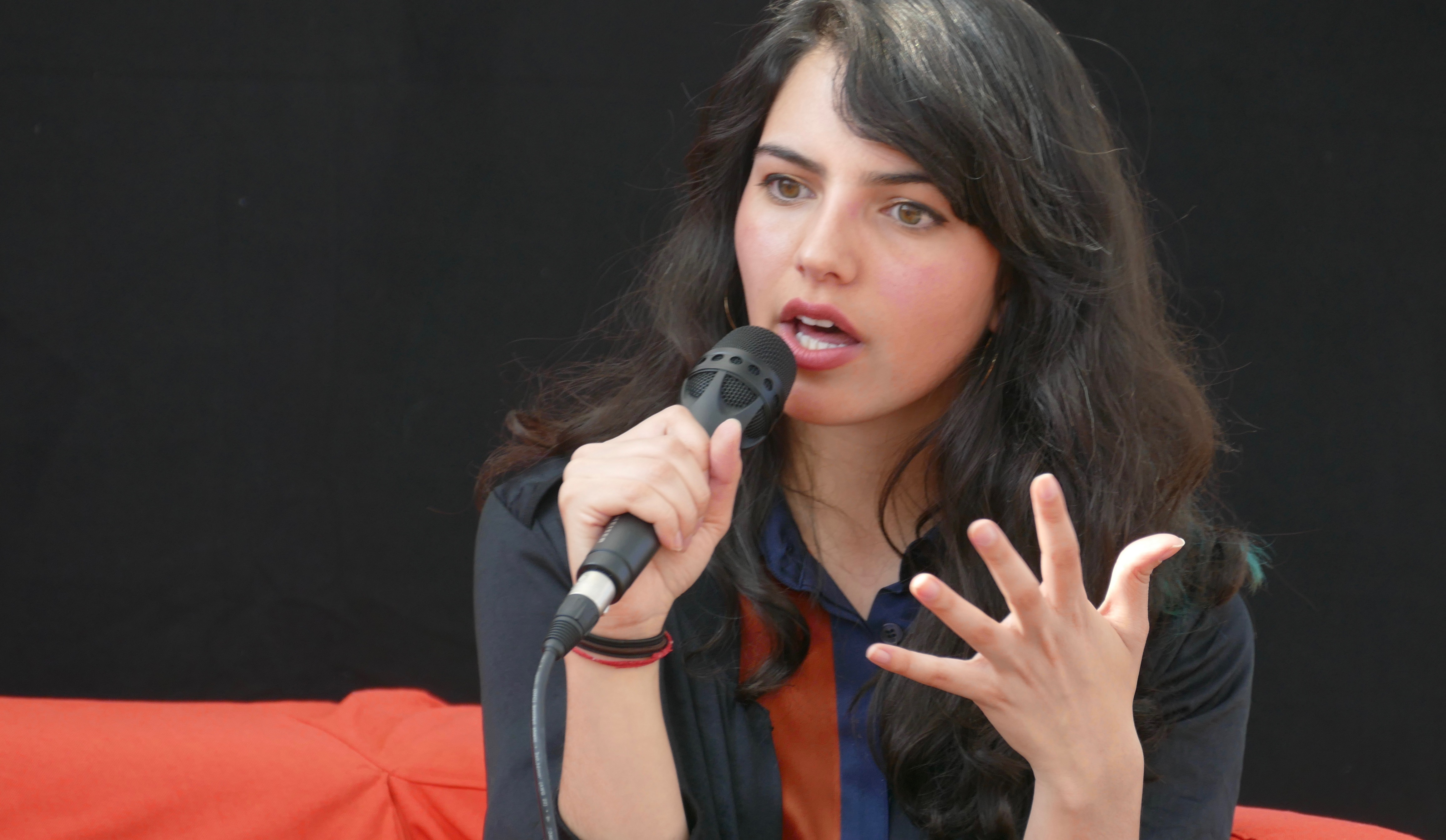 Fatima Farheen Mirza stellt auf der Leipziger Buchmesse 2019 ihren Roman "Worauf wir hoffen" (dtv) vor